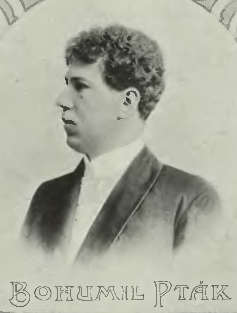 Portrét – Bohumil Pták (1869 - 1933), Český operní pěvec.